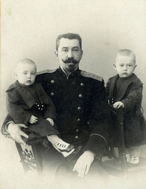 Пётр Карлович Гран (18 ноября 1869 — 1941, Бухарест), российский государственный деятель, впоследствии иркутский и томский губернатор, с сыновьями Колей (2 года и 5 мес) и Володей (1 год 6 мес), апрель 1903